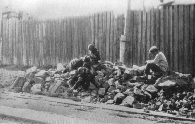 Фото часів Голодомору 1932-1933 рр